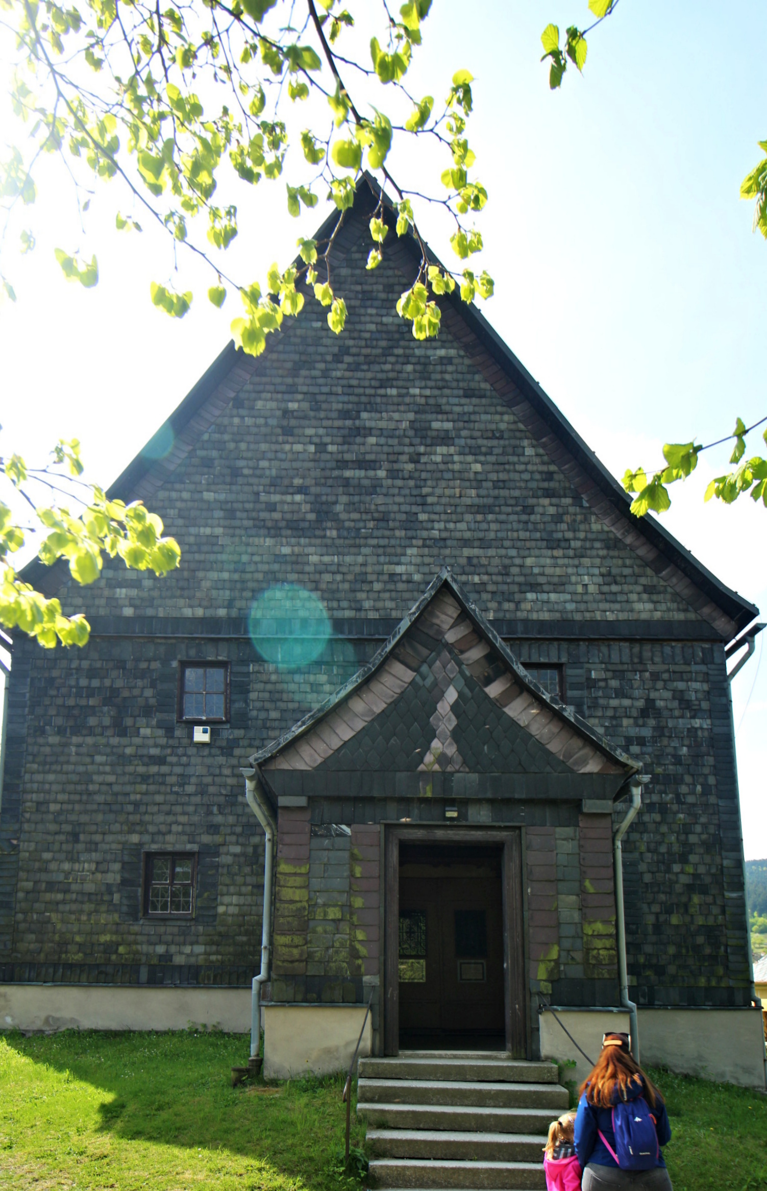 Kryštofovo údolí, hřbitovní kostel sv. Kryštofa s márničkou a farou